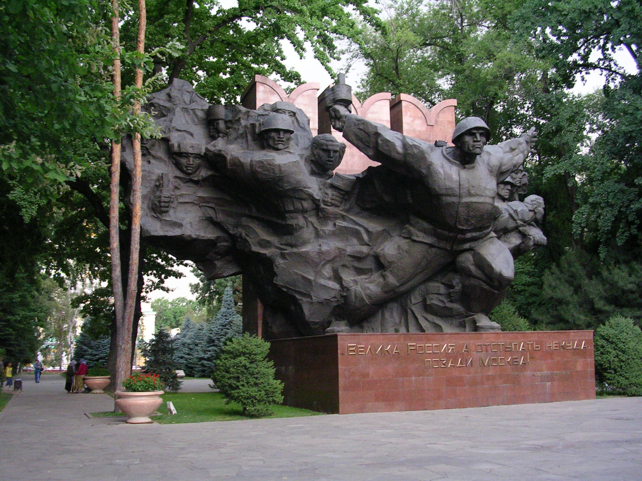 парк 28 панфиловцев в городе алматы